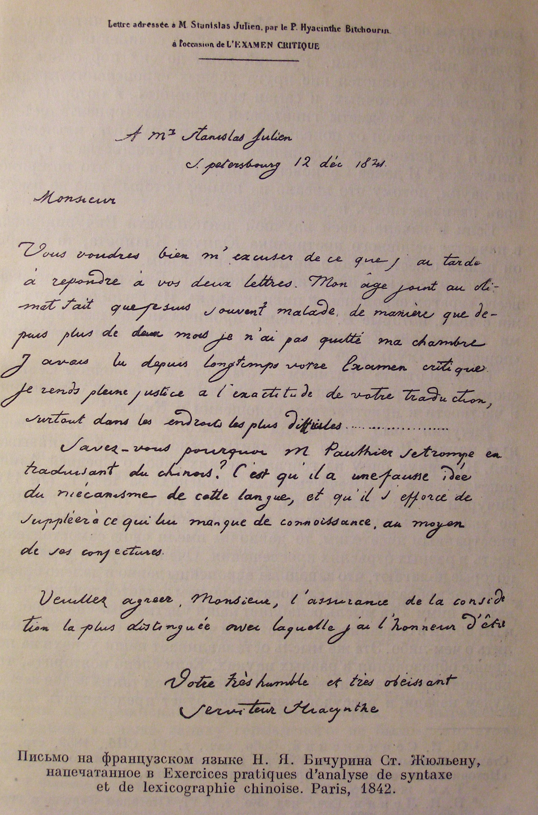 Автограф письма 17 декабря 1841 года, адресованного С. Жюльену. Воспроизведён в книге Exercices pratiques d’analyse, de syntaxe et de lexicographie chinoise